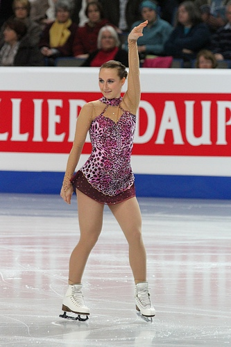 Натали Вайнзирль (Германия) на чемпионате Европы 2012 года.